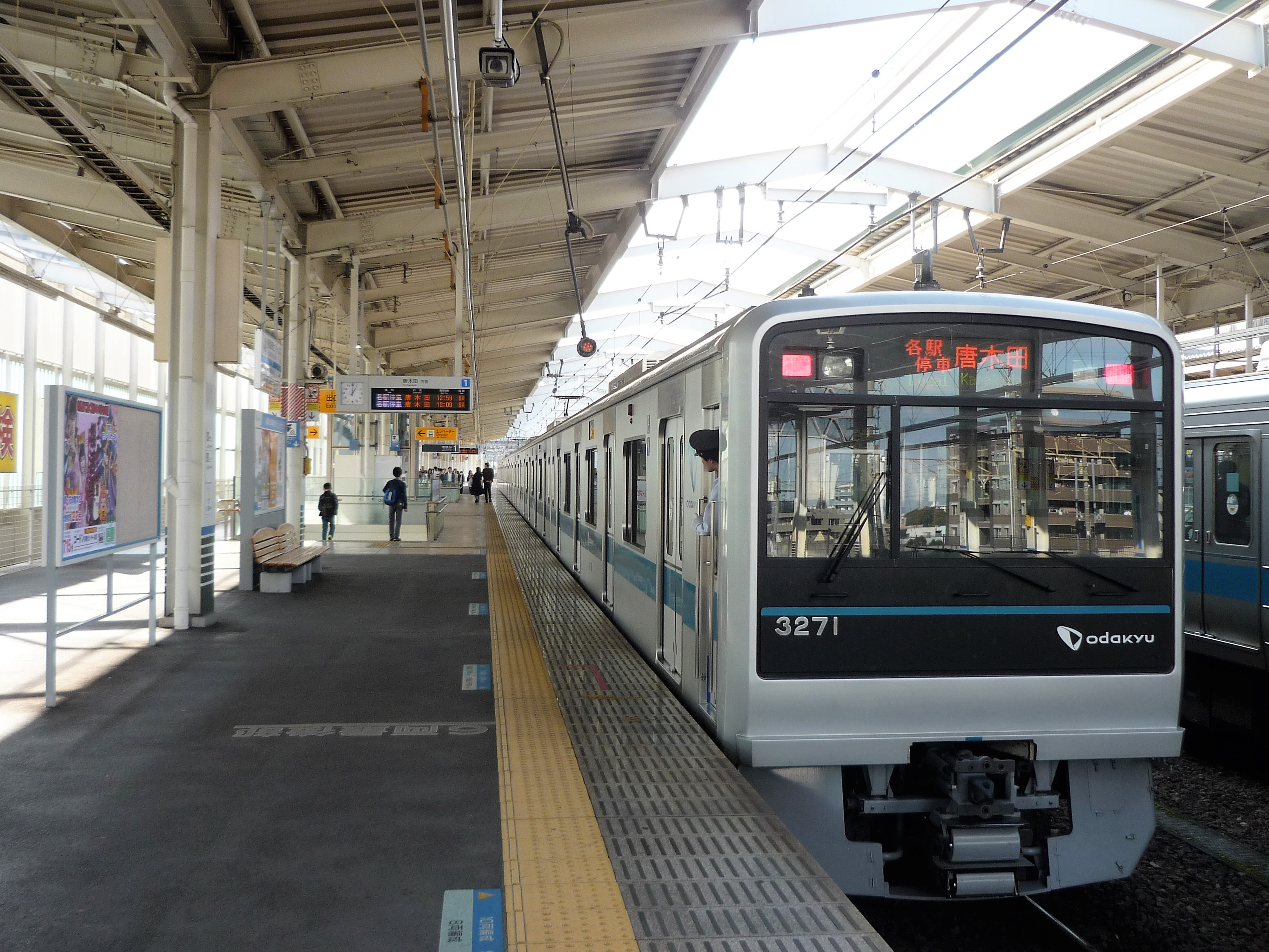 小田急多摩センター駅1番線に停車中の3000形3271 Panasonic Lumix DMC-FS3